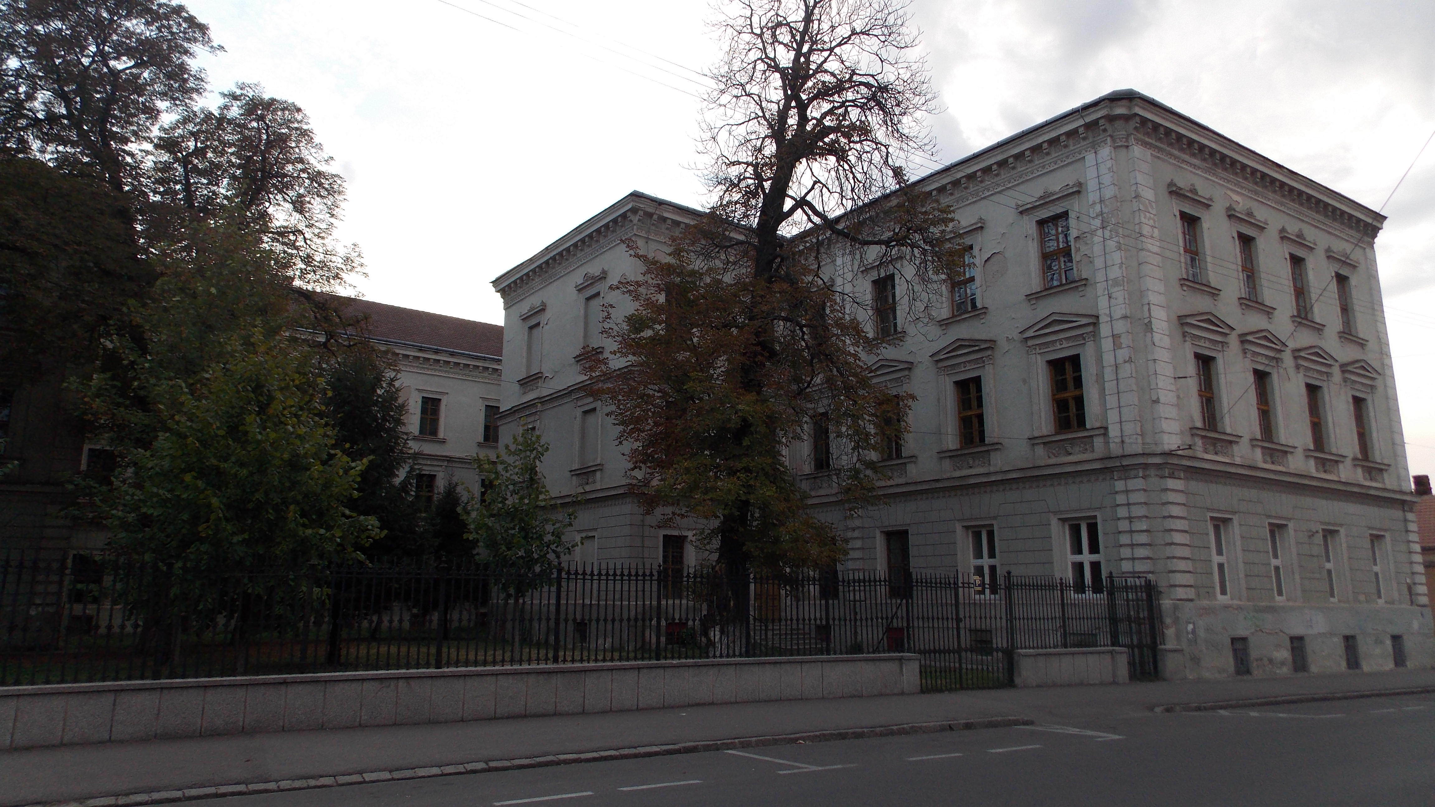 Colegiul Național "Mihai Eminescu", fosta mănăstire și Gimnaziu Premonstratens și Academie de Drept